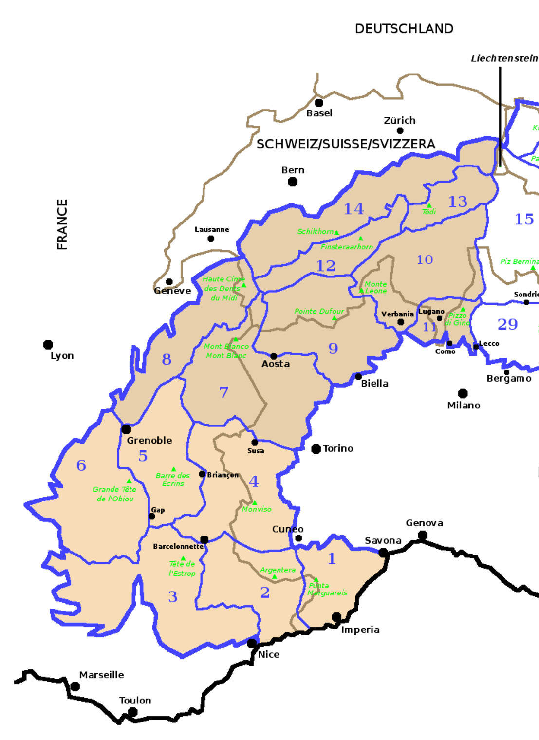 Carta schematica delle Alpi Occidentali secondo la SOIUSA, divise per colore in Alpi Sud-occidentali e Alpi Nord-occidentali